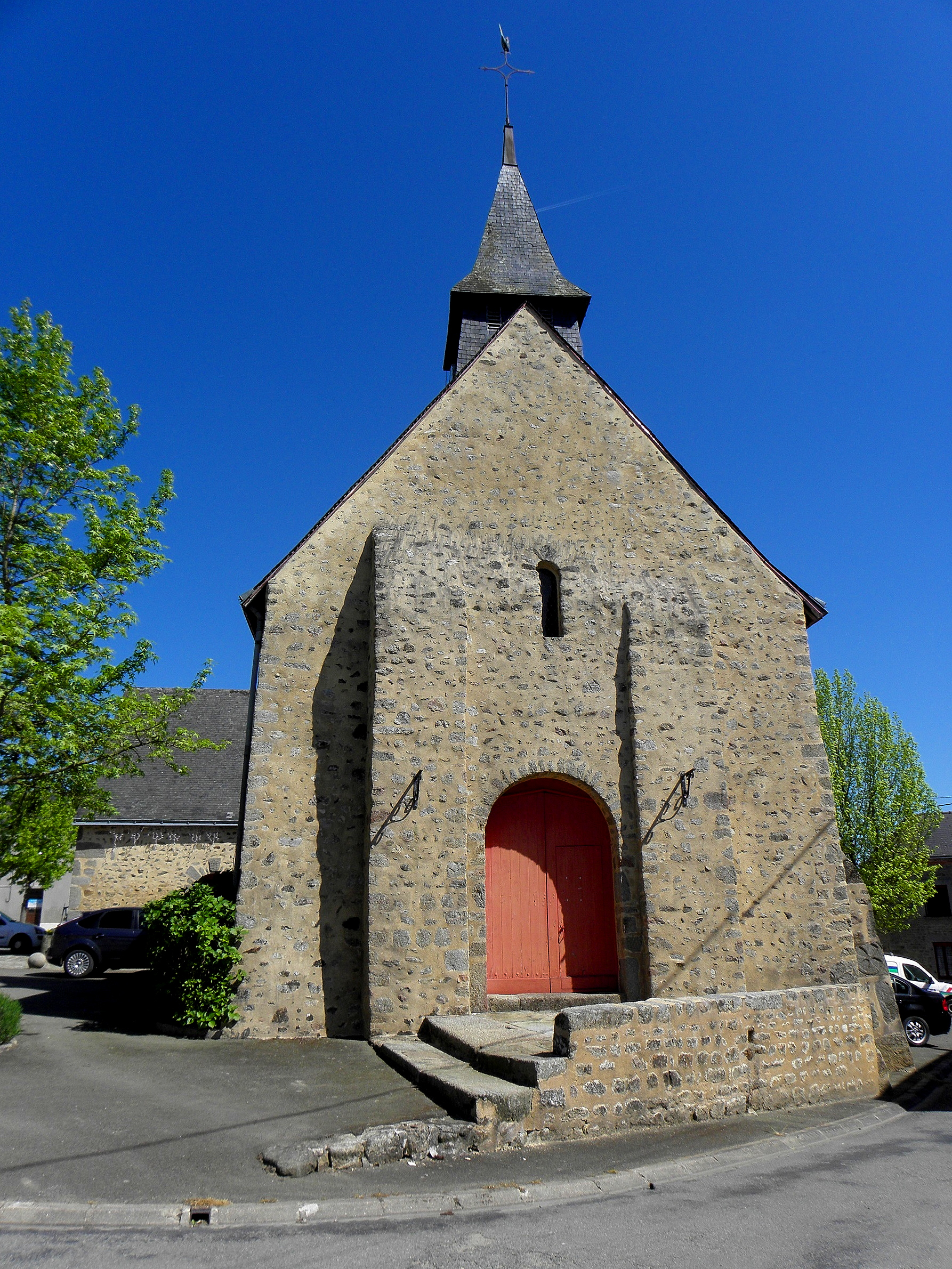 Église Saint-Julien de La Bazouge-des-Alleux (53). Façade occidentale.